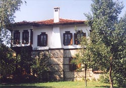 Възрожденско взаимно училище в Златоград.